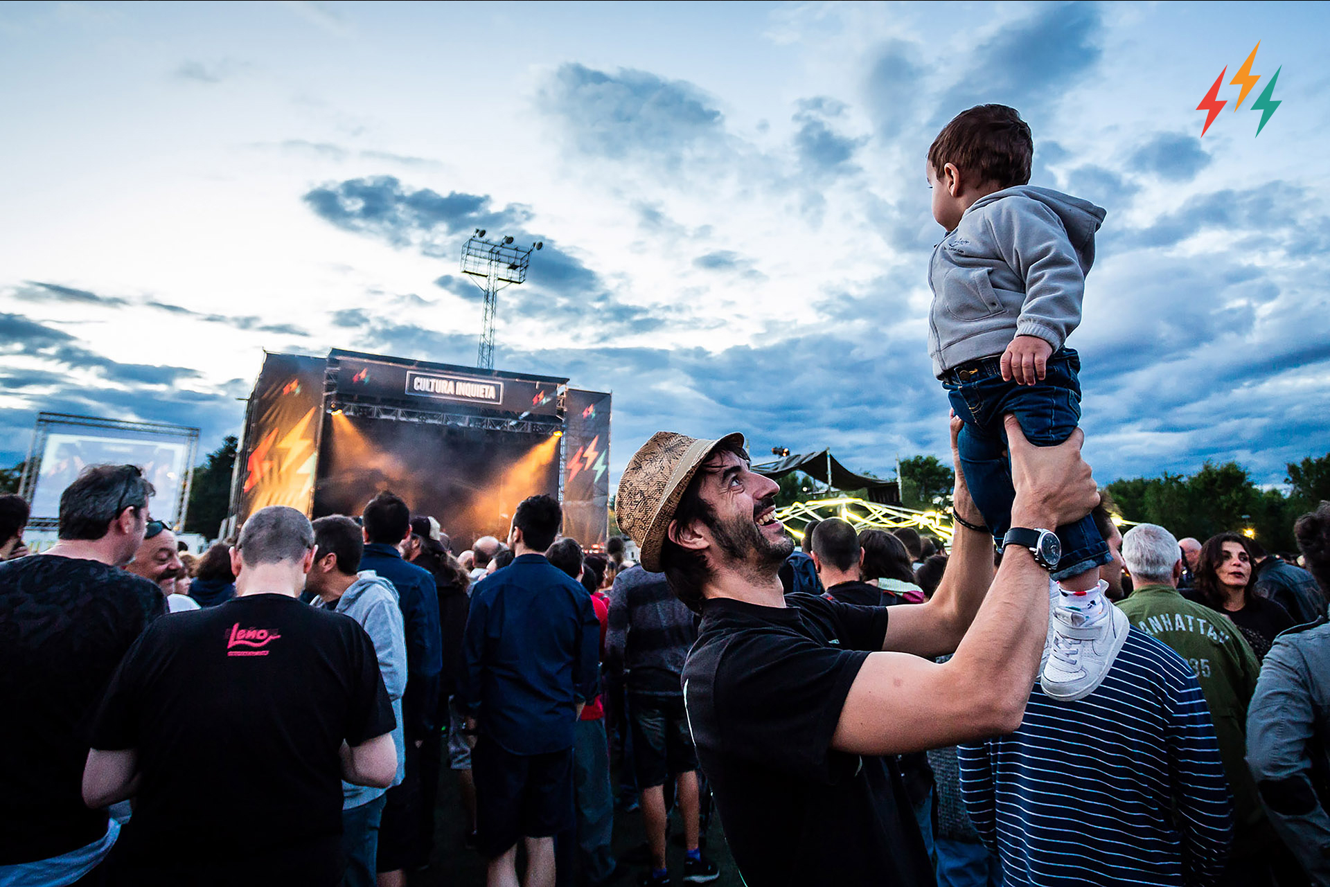 Público del Festival Cultura Inquieta durante un concierto de Rosendo